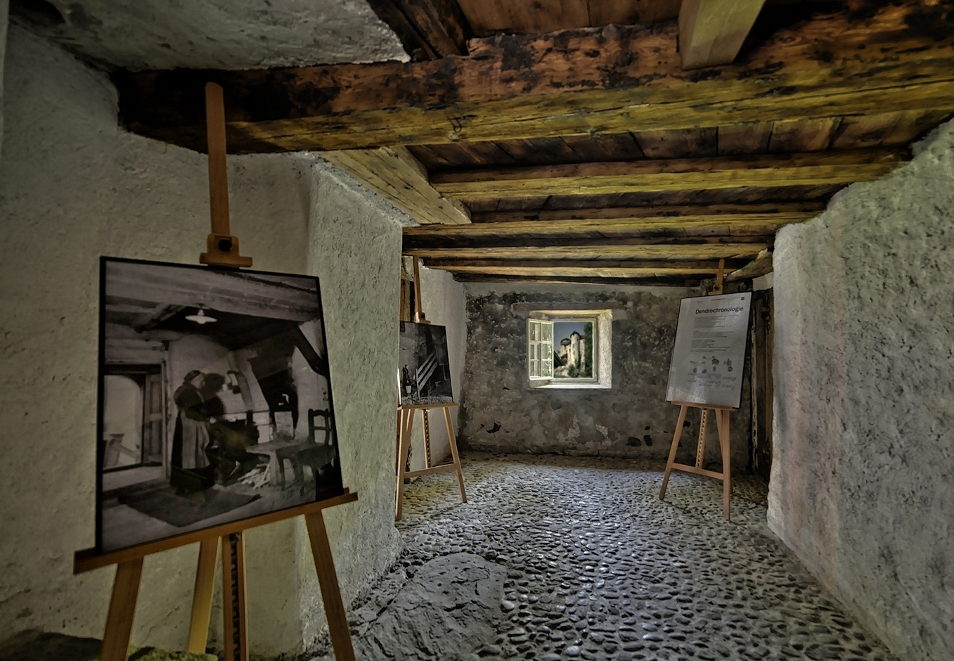 aus dem DEHIO Vorarlberg 1983: Sogenanntes Schloßguggerhaus, halbvollendeter Rheintalhof, Wohnteil 2geschossig über Werkstatt, giebelseitig in Bruchsteinmauerwerk errichtet, im Giebel Fachwerk, traufseitig über Mauerwerk Bohlenständerkonstruktion, gekoppelte Fenster, segmentbogige Eingangstür, traufseitige Freitreppe.*** An der Sebastianstraße Nr.24 in Dornbirn, Oberdorf; Es ist das älteste Haus (um 13.Jh.) in Dornbirn. Der Fensterausblick (zum Tag des Denkmals, Thema Illusion 2014), zeigt die hier nicht vorhandene Burg Neu-Ems (Schloss Glopper), in Hohenems, Vorarlberg Dieses 1343 erbaute Schloss wurde nach seiner Zerstörung im Appenzellerkrieg (1407) wieder aufgebaut. Spätgotische Anlage von seltener Geschlossenheit (kleinräumige Hochburg mit bergfriedartigem Bollwerk und angebautem Palas). Privatbesitz der Grafenfamilie Waldburg-Zeil. (Quelle: ) Fensterausschnitt Dieses Bild wurde anlässlich des österreichischen Tags des Denkmals 2014 in Vorarlberg eingereicht.